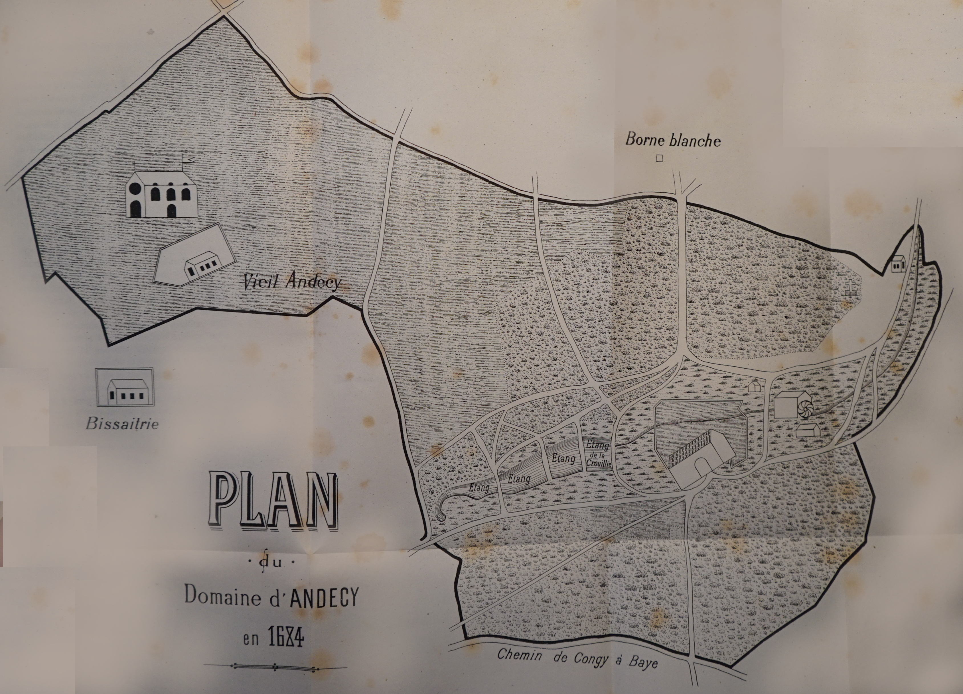 image de l'abbaye d'Andecy.